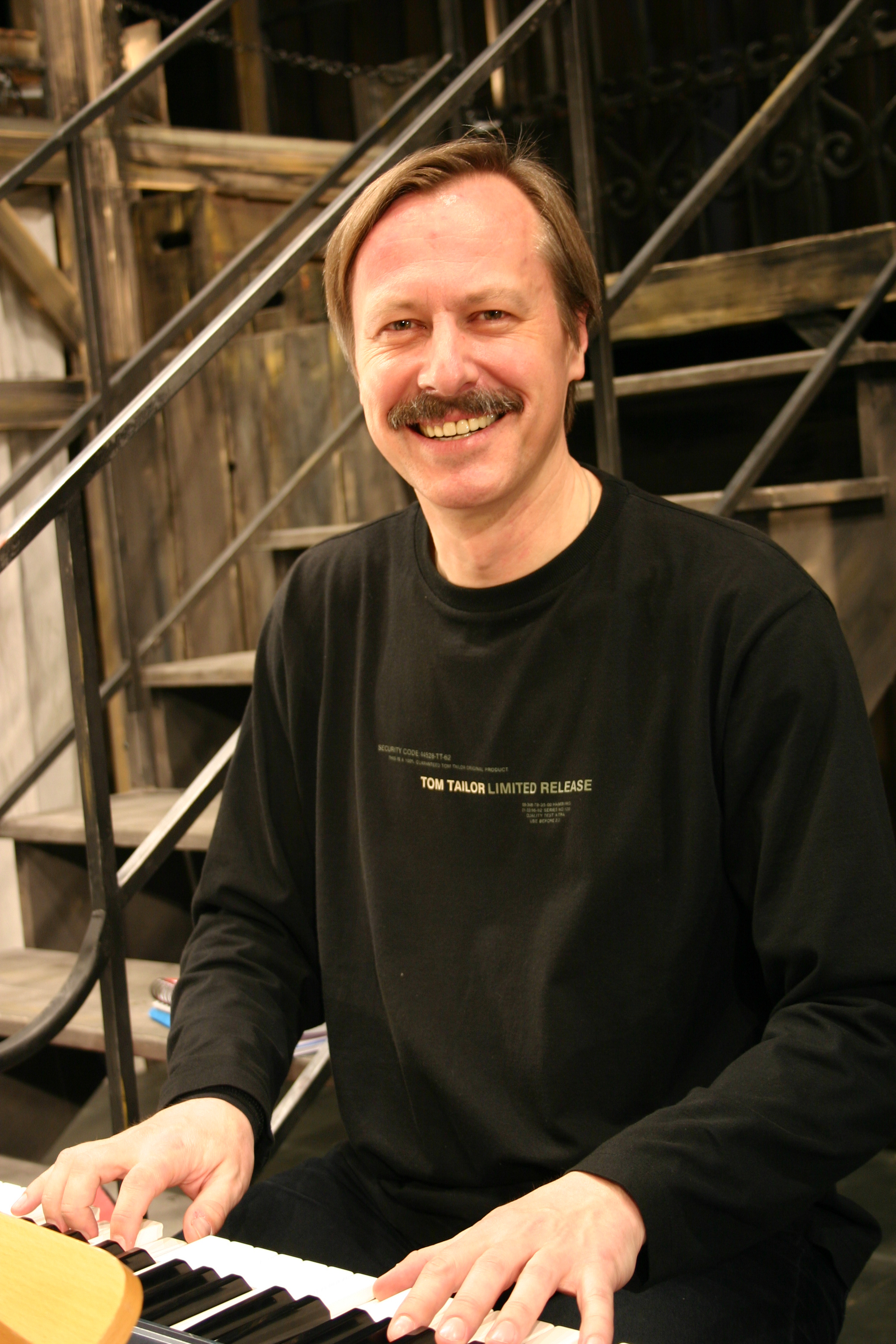 Павел Зингер